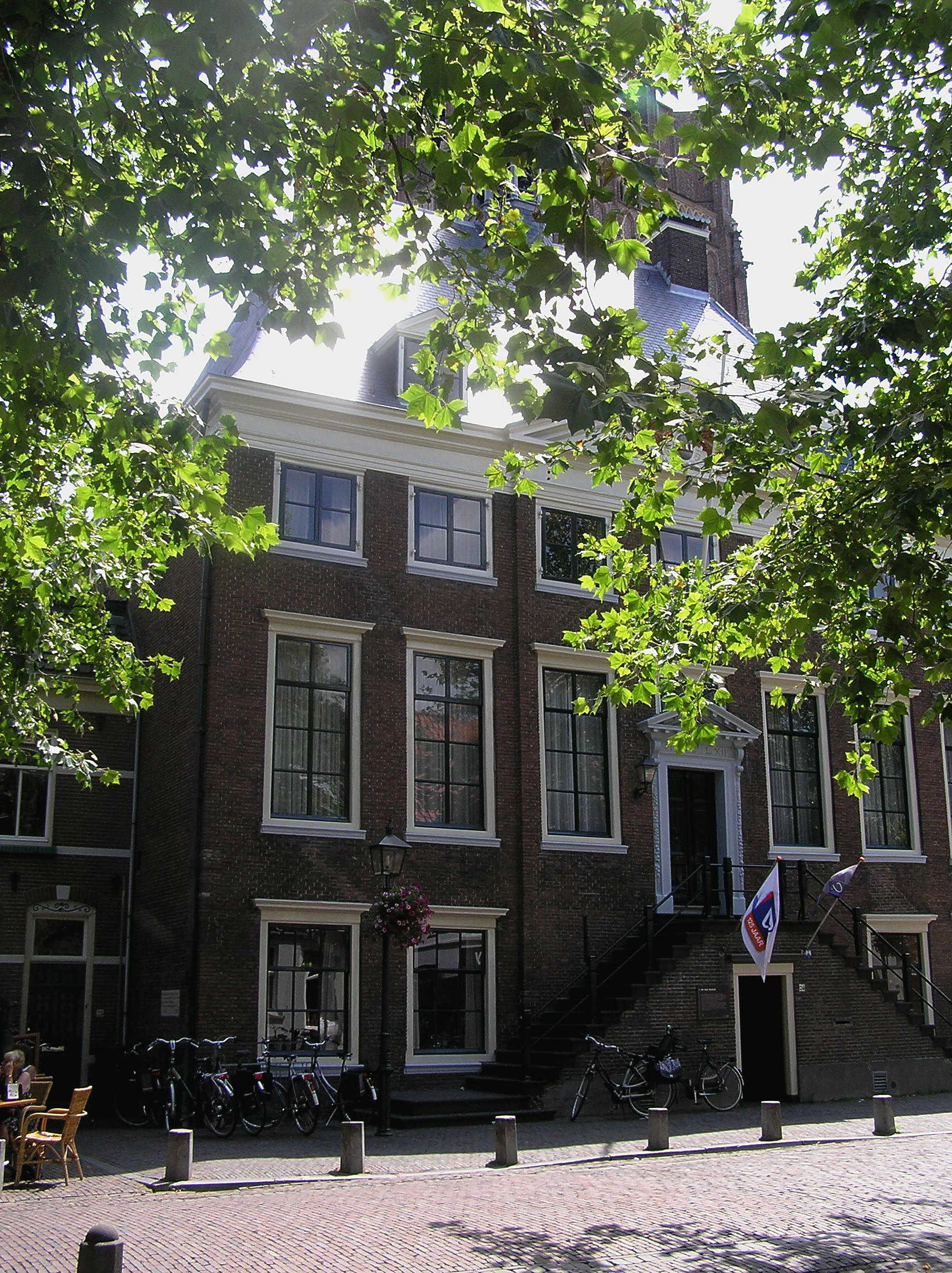 Wijk bij Duurstede Markt 24